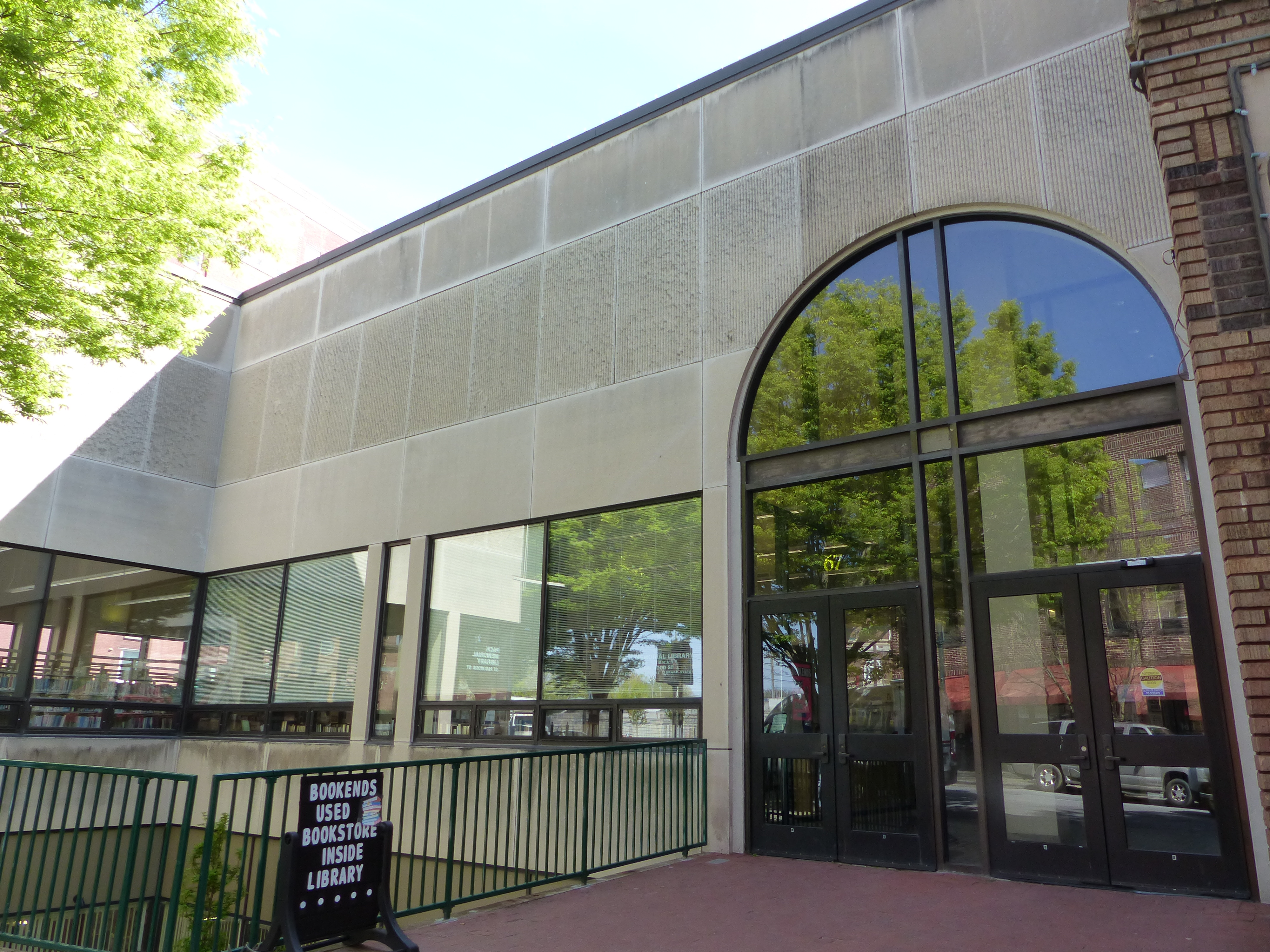 67 Haywood St